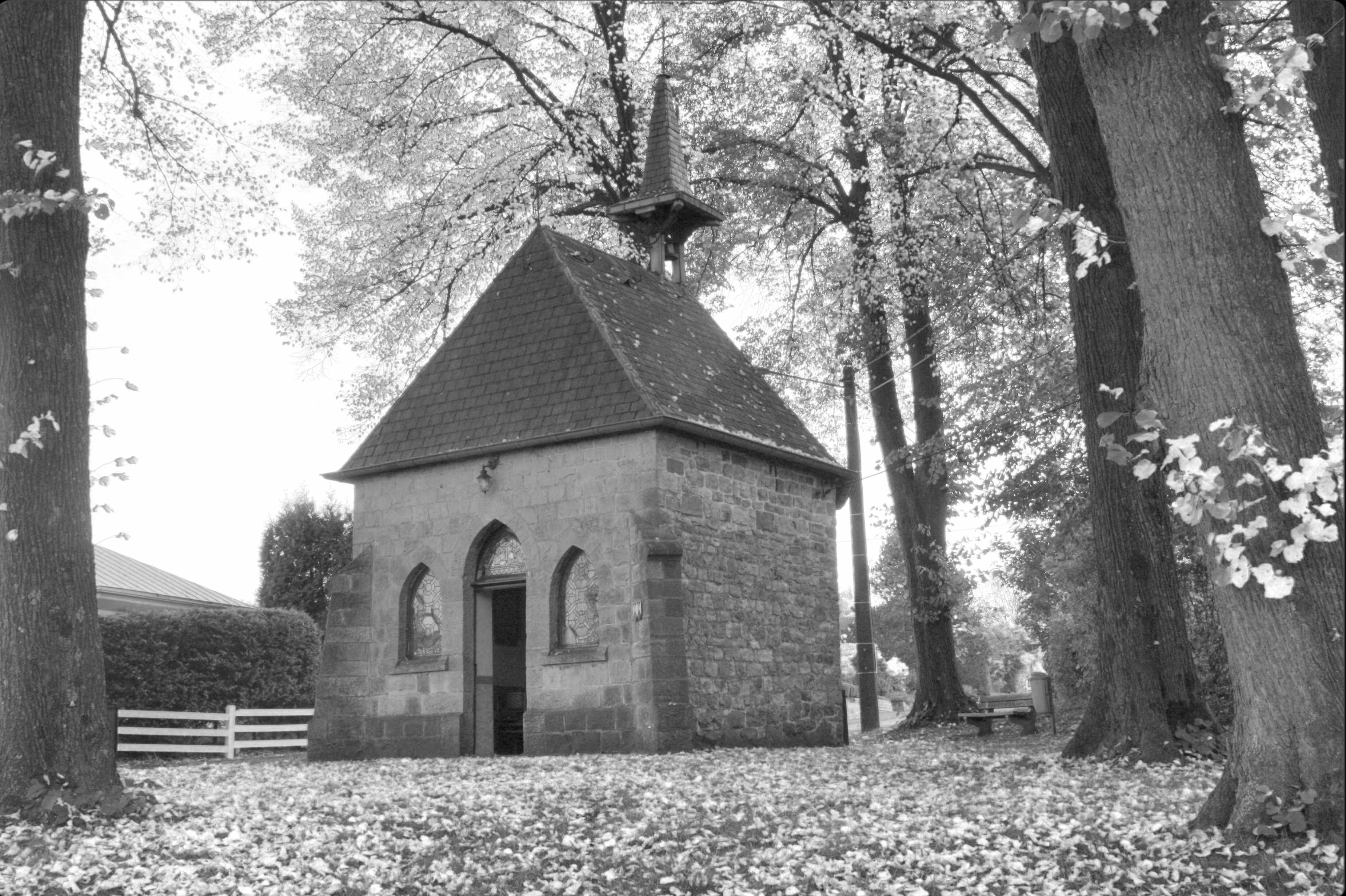 Die Kapelle wurde auf den Scherbenhalden der ehemaligen Töpfereien gebaut. Der Ortsteil rund um die Rochuskapelle war der älteste Dorfteil Hausets.